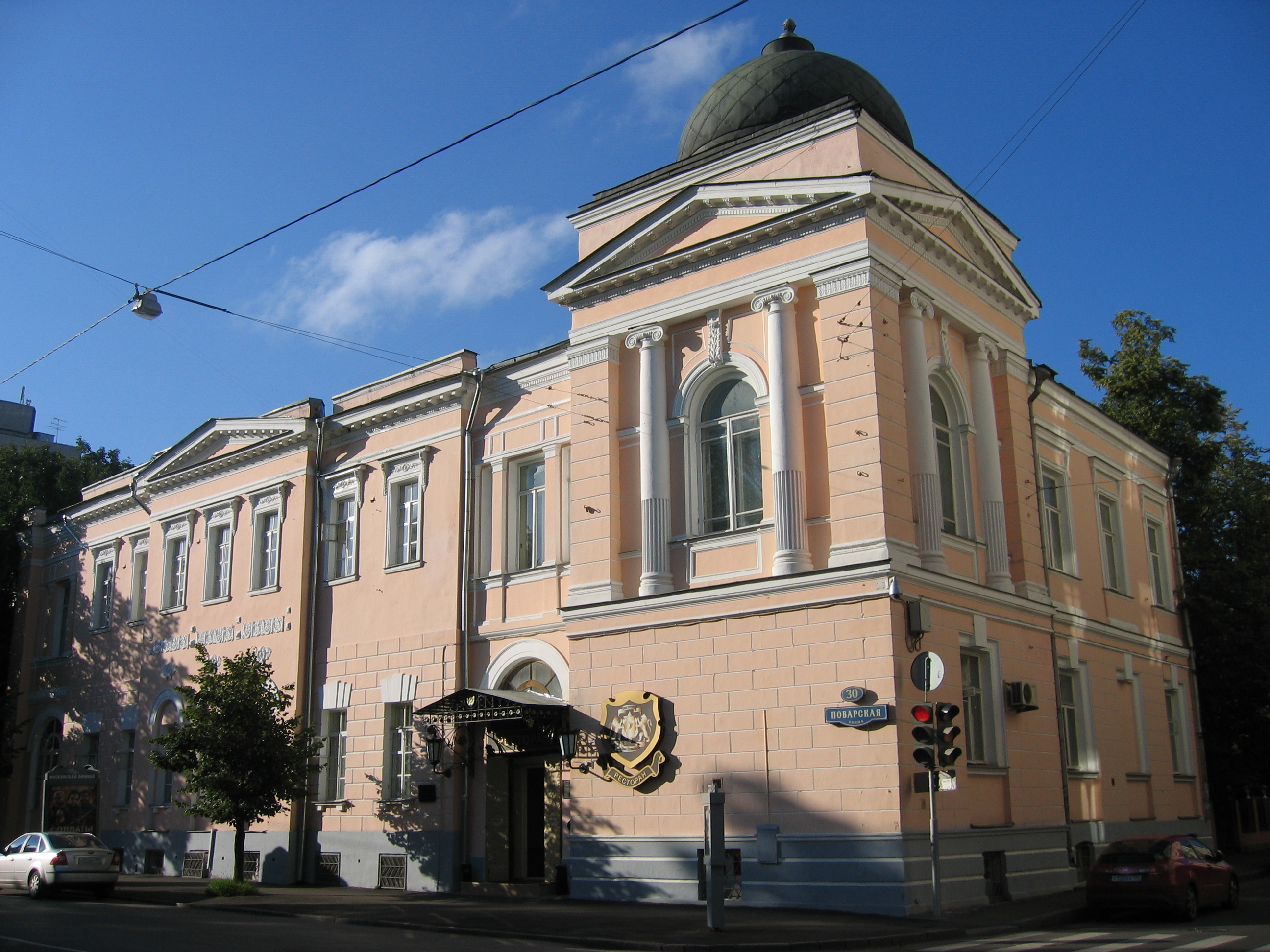 Das Gebäude des Gnessin-Musikinstituts in Moskau